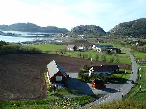 From Osen, Sør-Trøndelag, Norway.